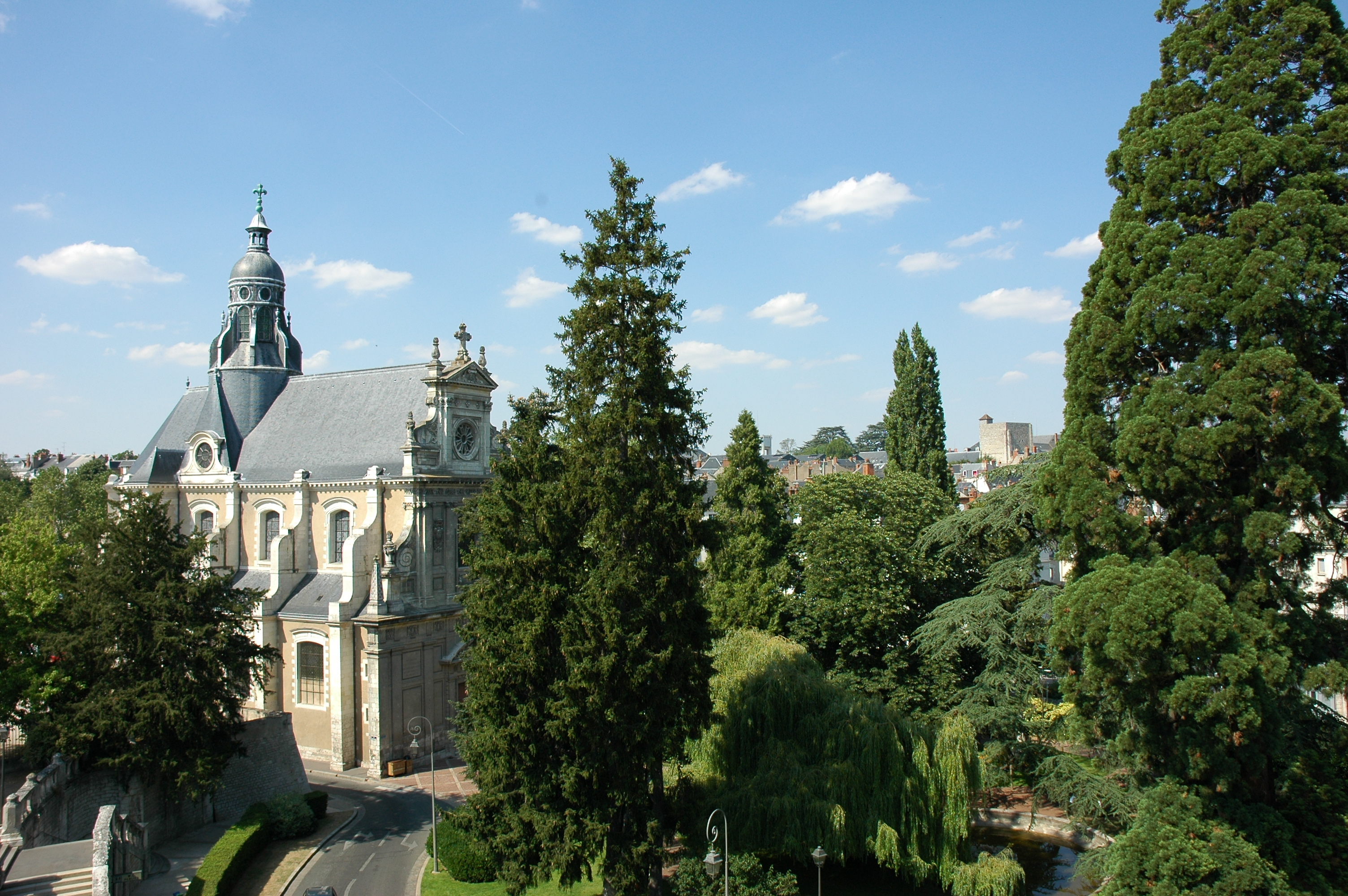 France Loir-et-Cher Blois Église Saint-Vincent Photographie prise par Patrick GIRAUD